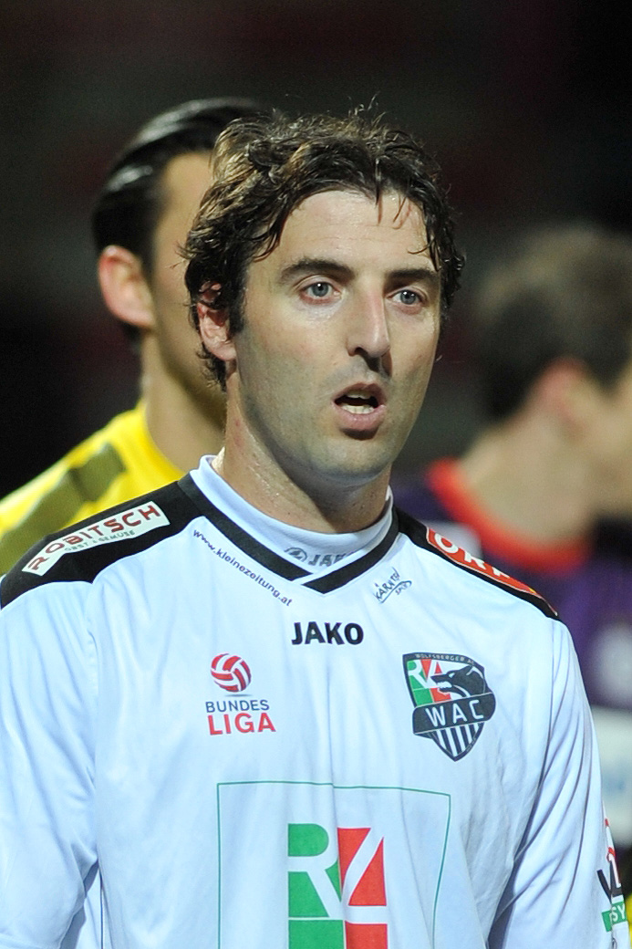 Bundesliga:FK Austria Wien - RZ Pellets WAC Joachim Standfest